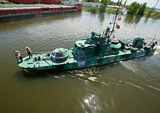 Проекта 1204 "Шмель" - Дивизионом артиллерийских катеров охраны водного района Каспийской флотилии